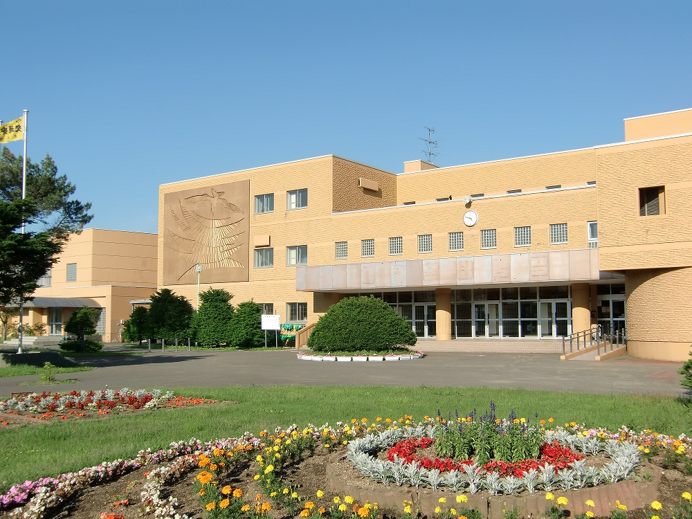 恵み野中学校校舎（2013年6月23日撮影）